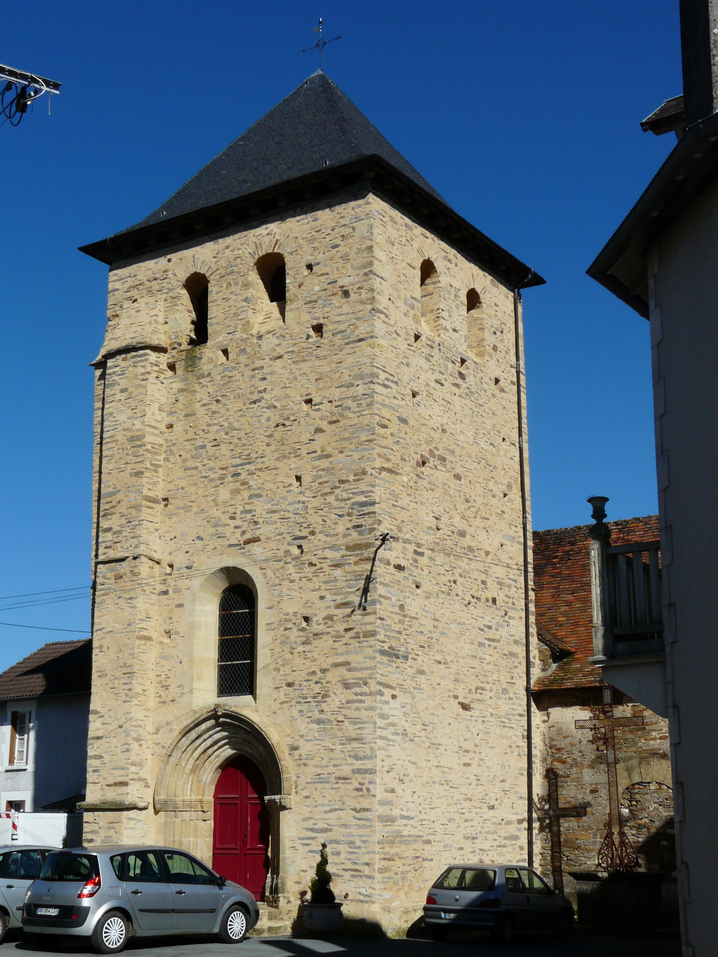 Le clocher de l'église Saint-Léger, Sarlande, Dordogne, France.